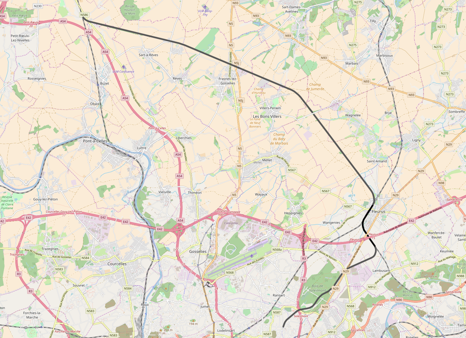 Belgian Railway Line 131, Y Noir-Dieu - Bois-de-Nivelles